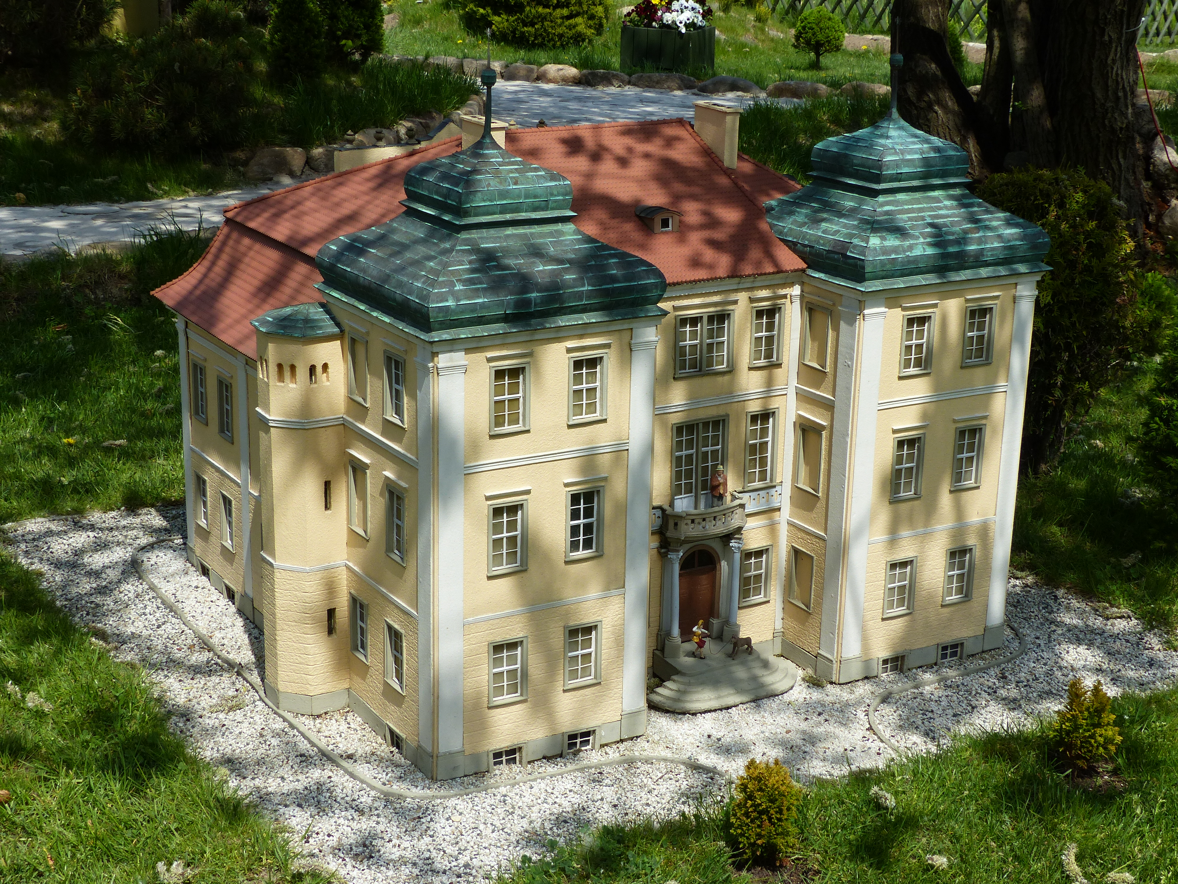 Miniaturen Park der Niederschlesischen Baudenkmäler in Kowary, Niederschlesien